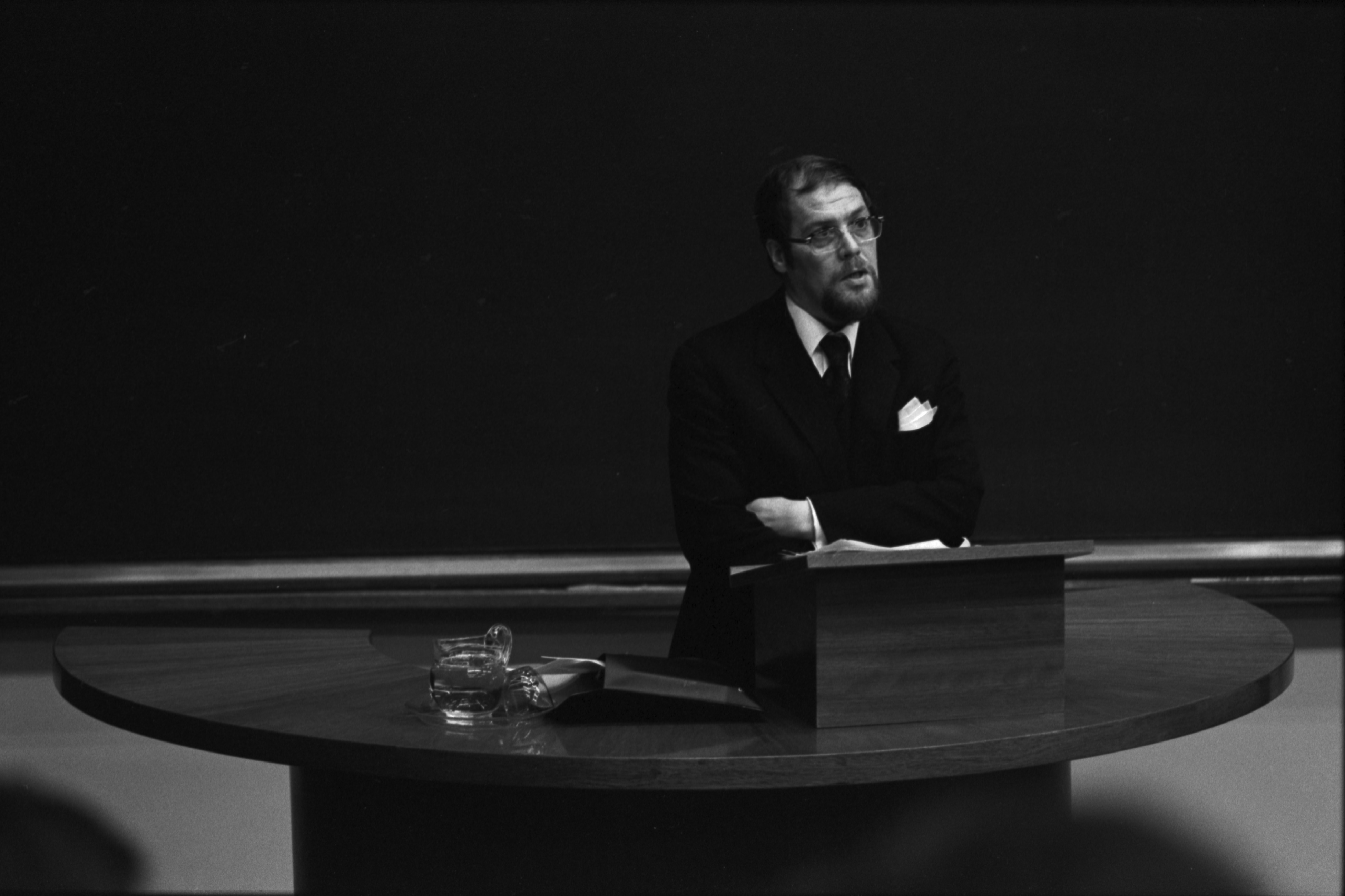 Valtiotieteen maisteri Yrjö-Paavo Häyrynen (1933–2014) väitöstilaisuudessaan Helsingin yliopiston Porthania-rakennuksessa.